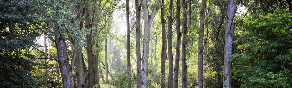 Rheinaue Grünes C